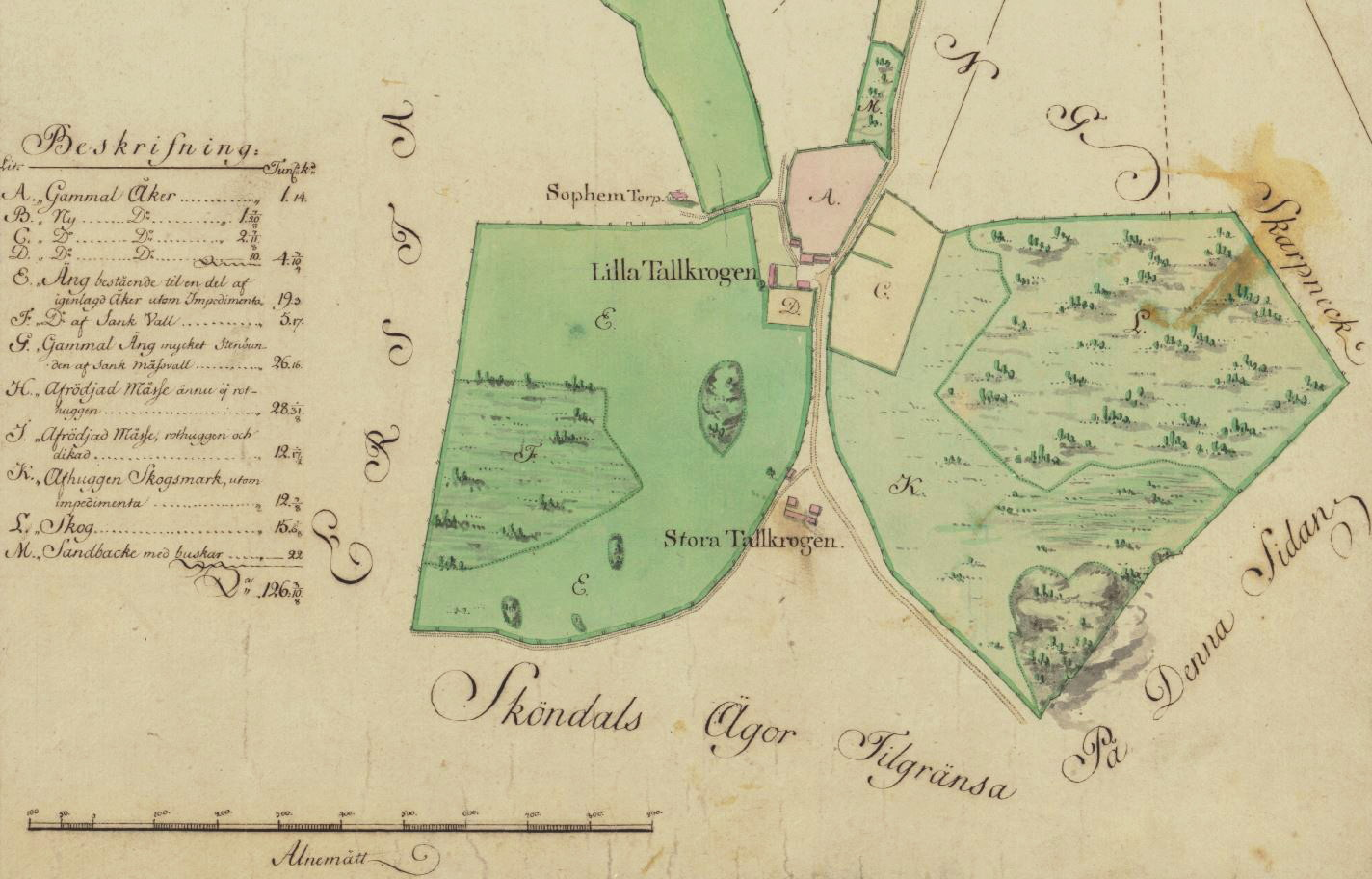 Charta öfver Lilla Tallkrogen (del av)